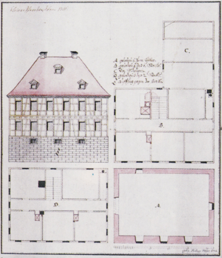 Bauplan des Pfarrhauses von Flein (1736). Stadtarchiv Heilbronn, Pläne/Druckgrafik, Signatur E005-121,2-0